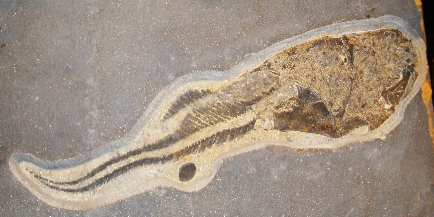 Fossil of Coccosteus, an extinct fish- Took the photo at Fossil Show, Munchen 2011